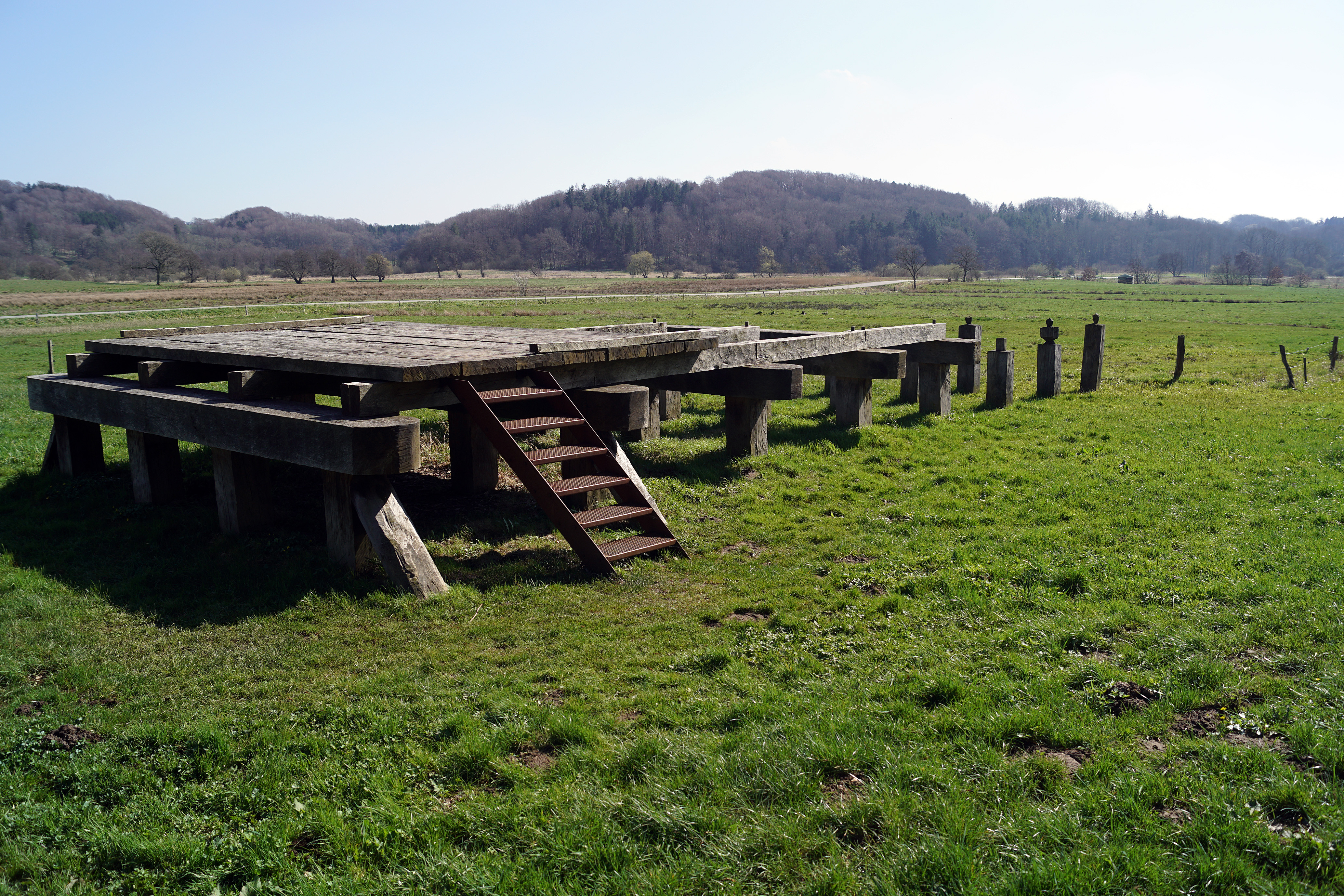 Rekomnstruktion af Ravningbroen ved dens nordlige ende